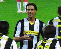 Torino, stadio Olimpico, 13 novembre 2008. Juventus – Genoa (4-1), campionato italiano di Serie A 2008-09. Il difensore bianconero Nicola Legrottaglie.